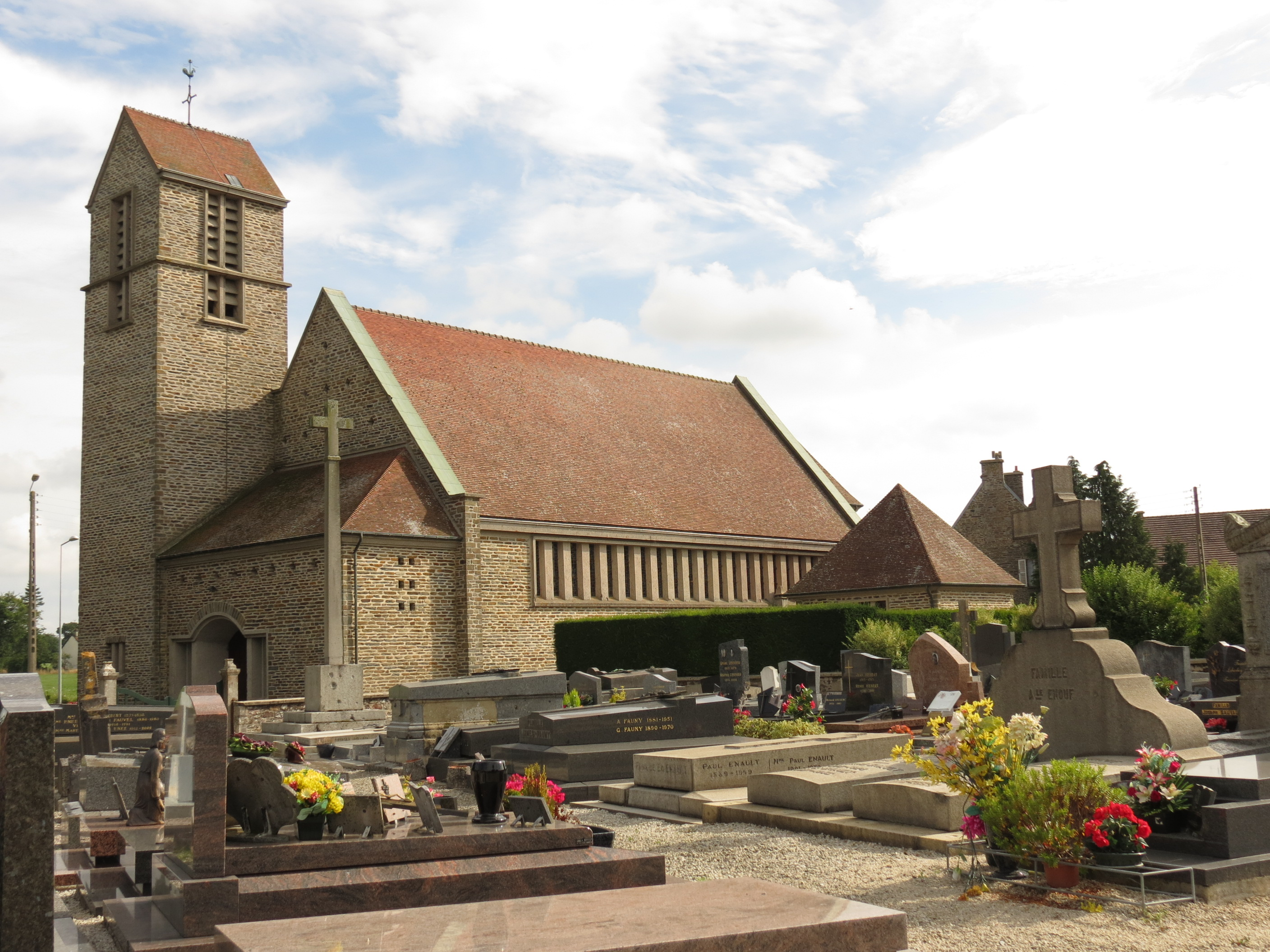 Eglise